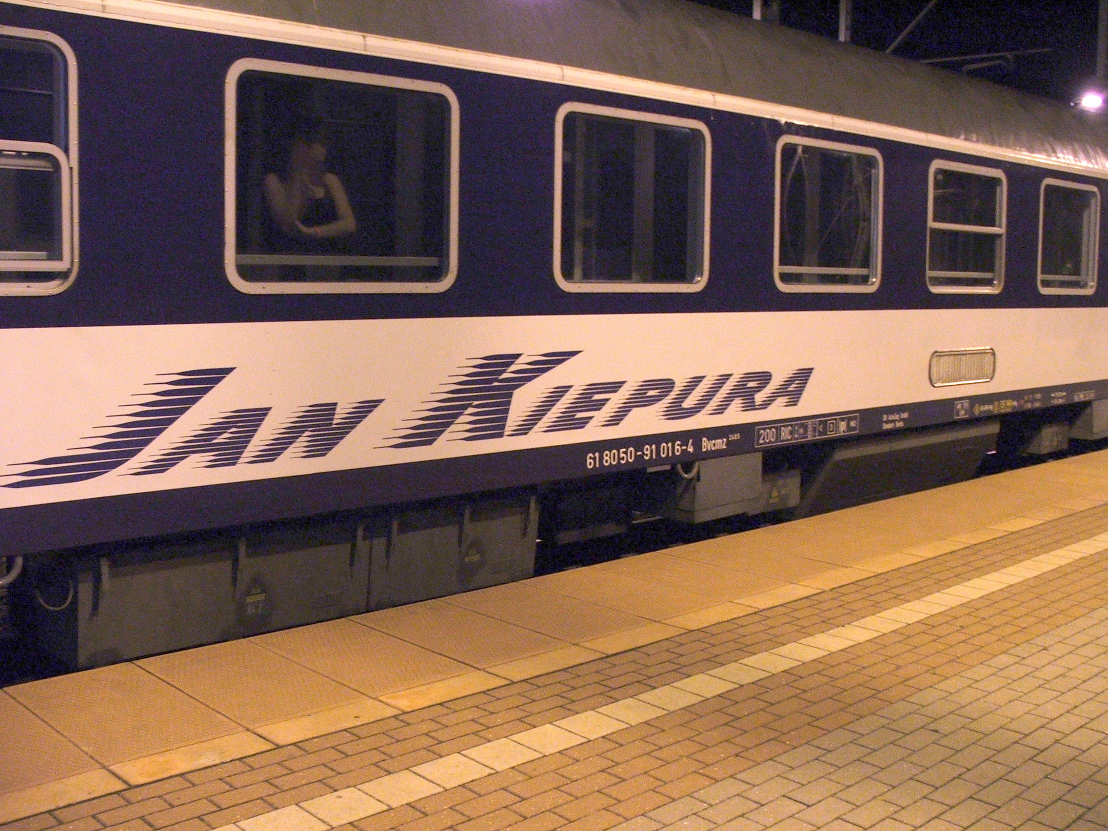 EN Jan Kiepura (Liegewagen)